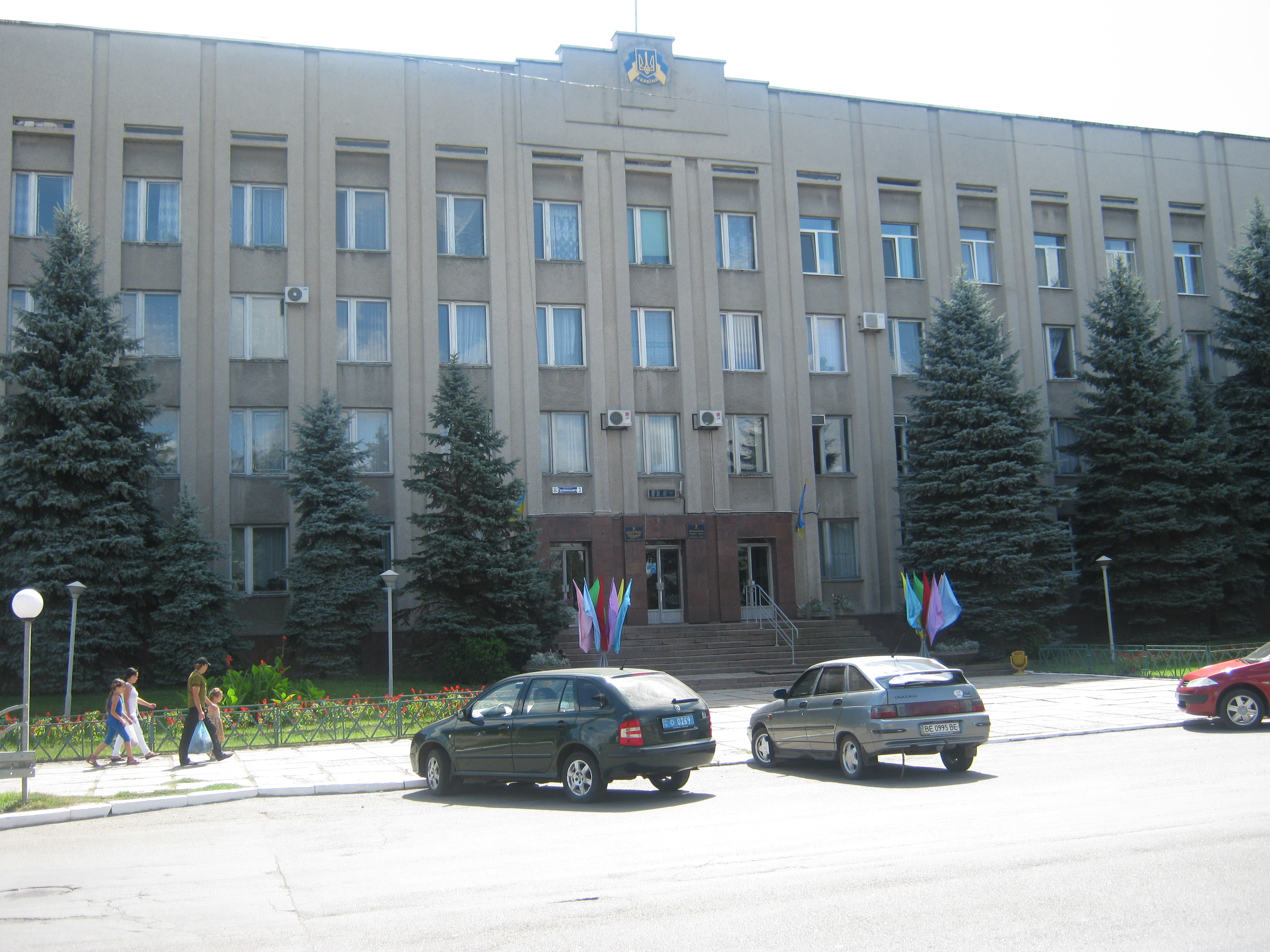 Pervomajskas pilsētas padomes ēka